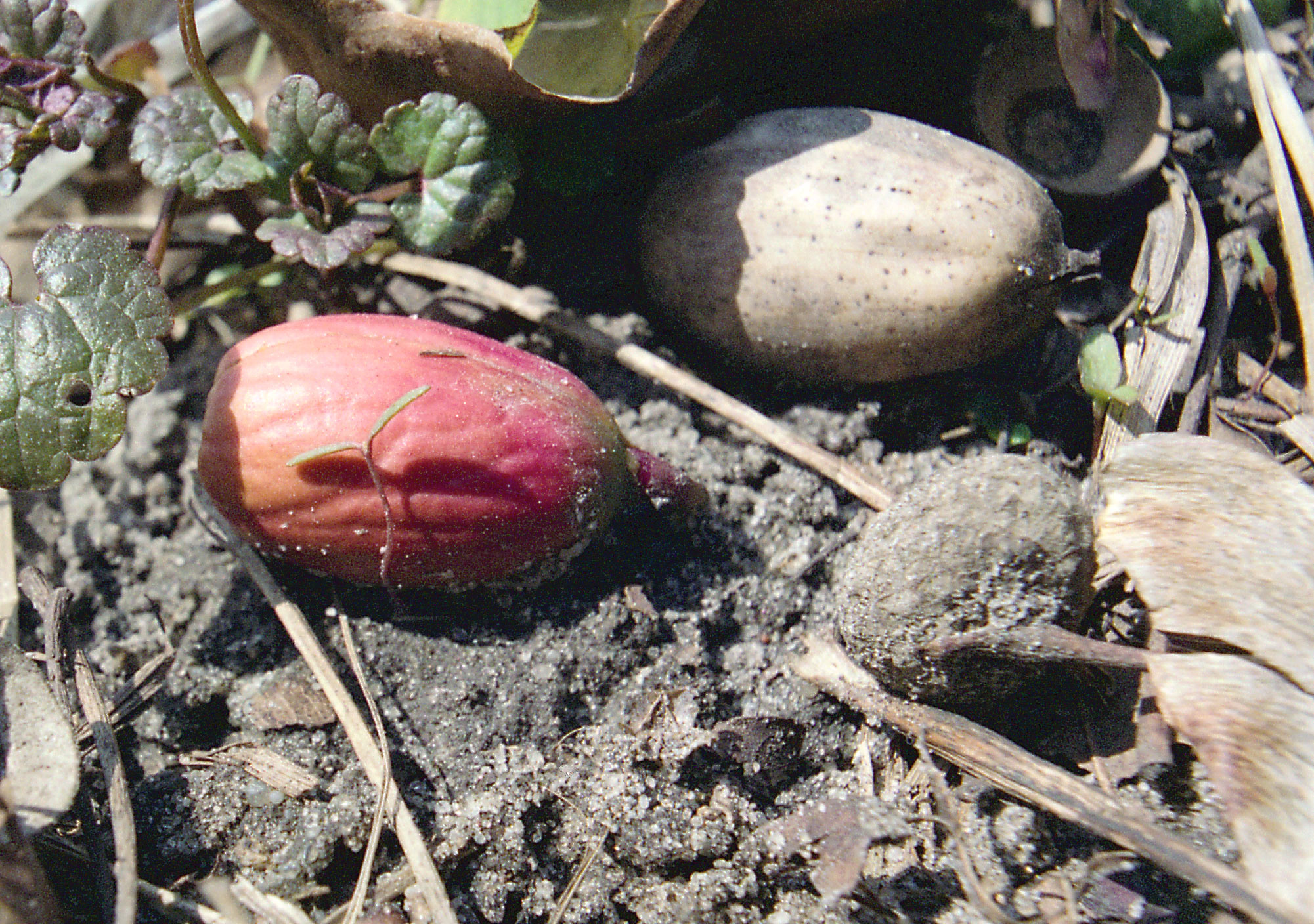 quercus robur acorn